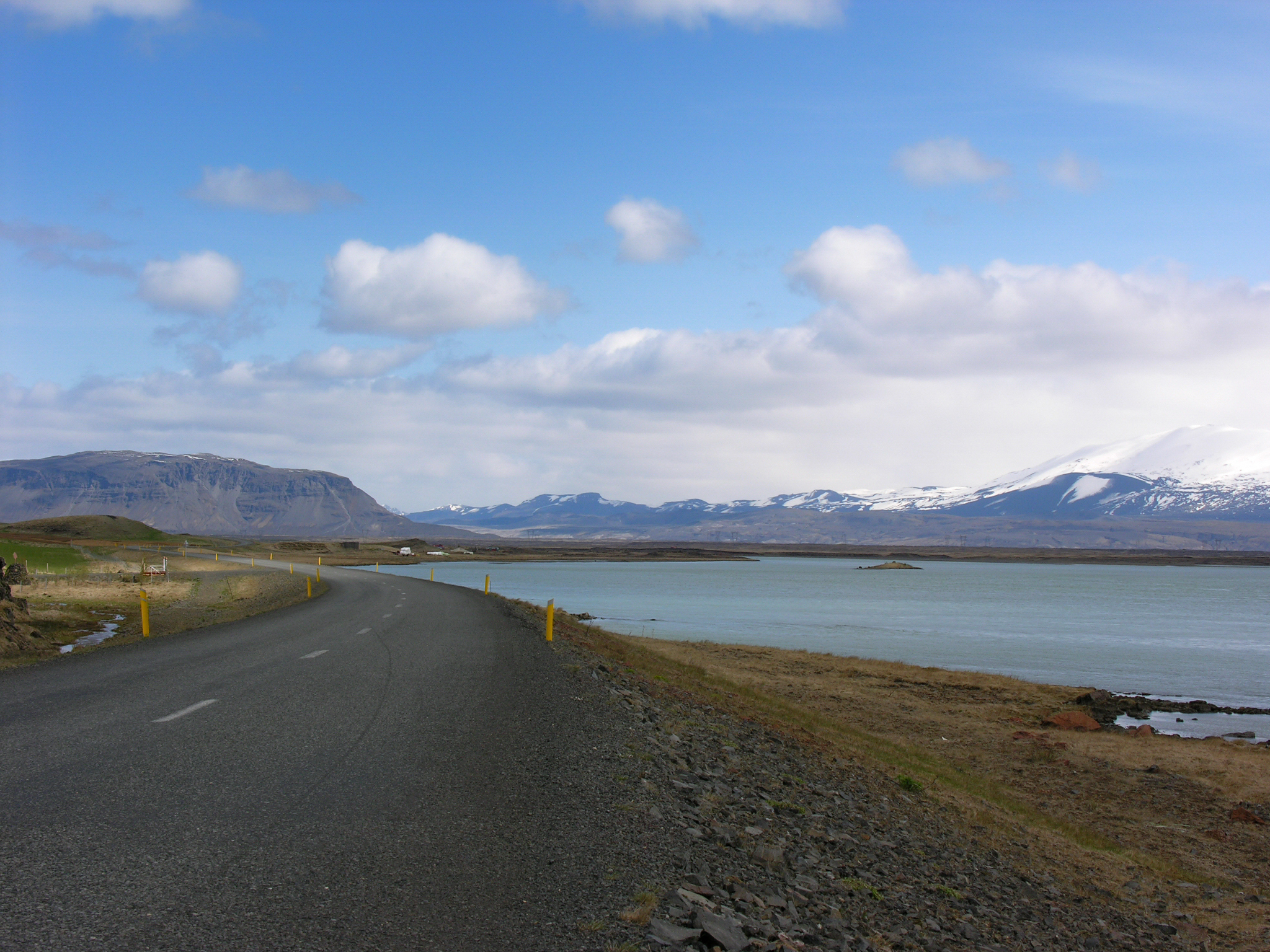 Iceland, Þjórsá and Hekla